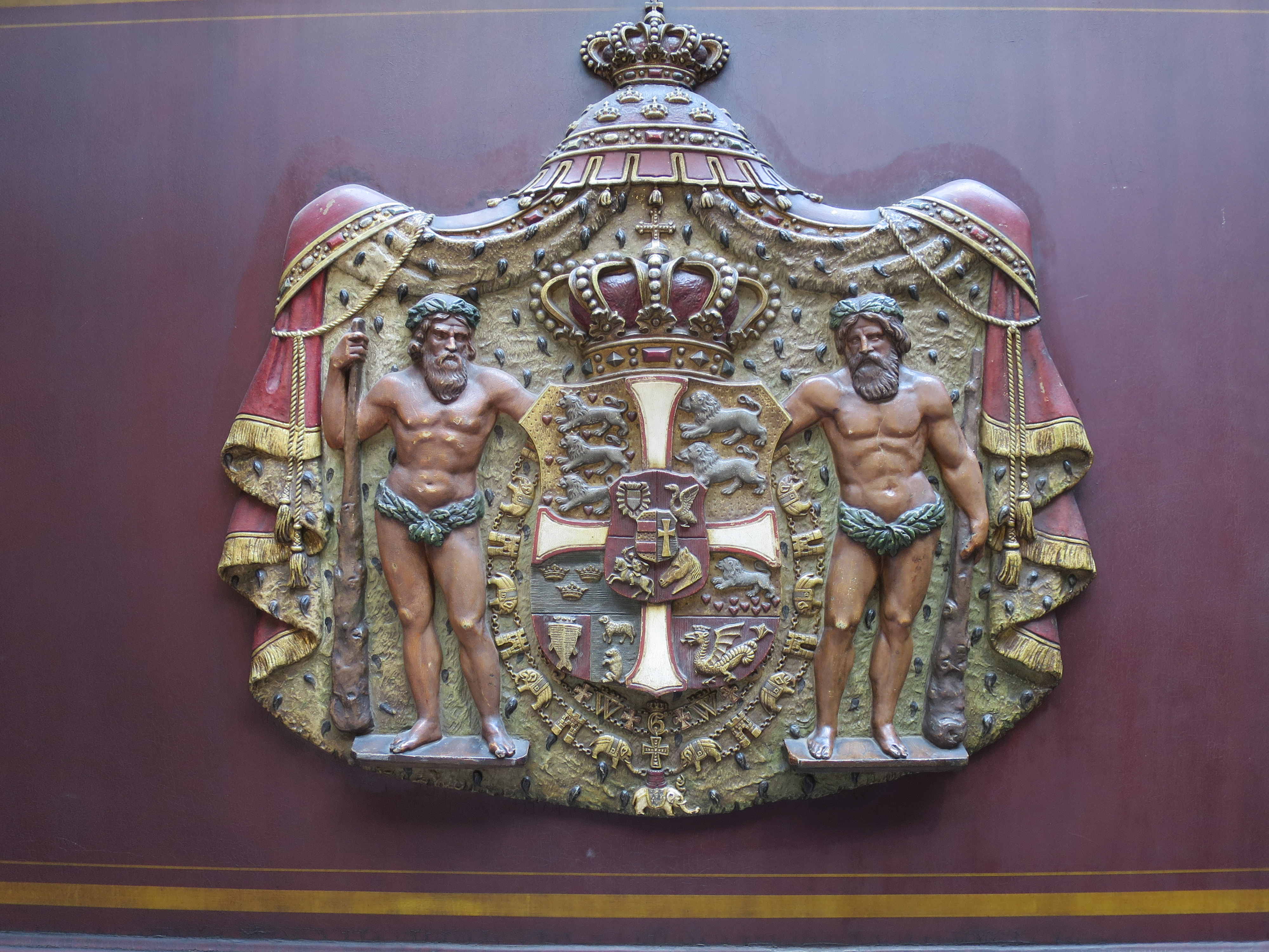 Wappen am Königswagen S 1, Dänisches Eisenbahnmuseum